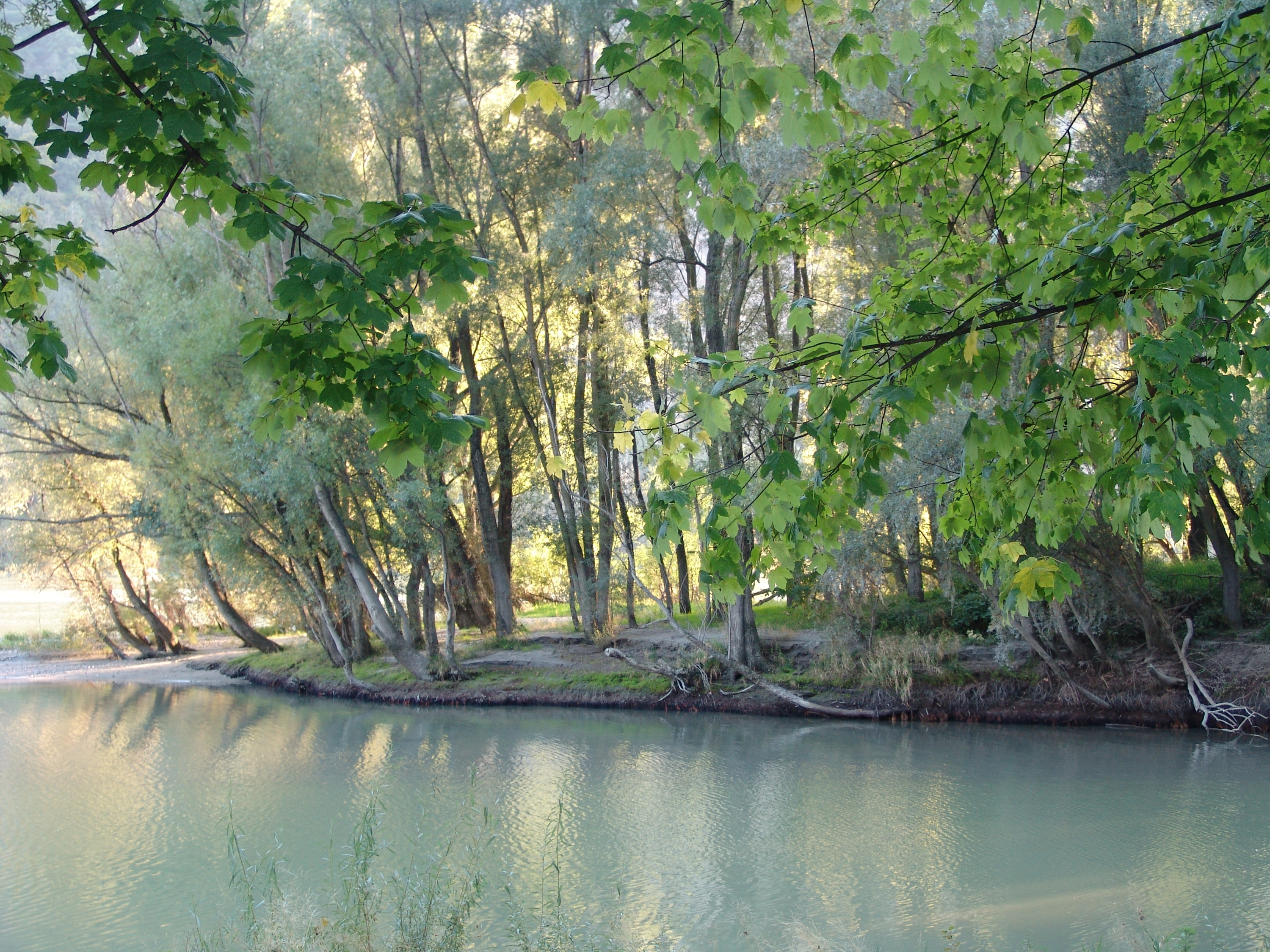 Ufer der Donau mit vorgelagerter Insel in der Wachau nahe bei Dürnstein